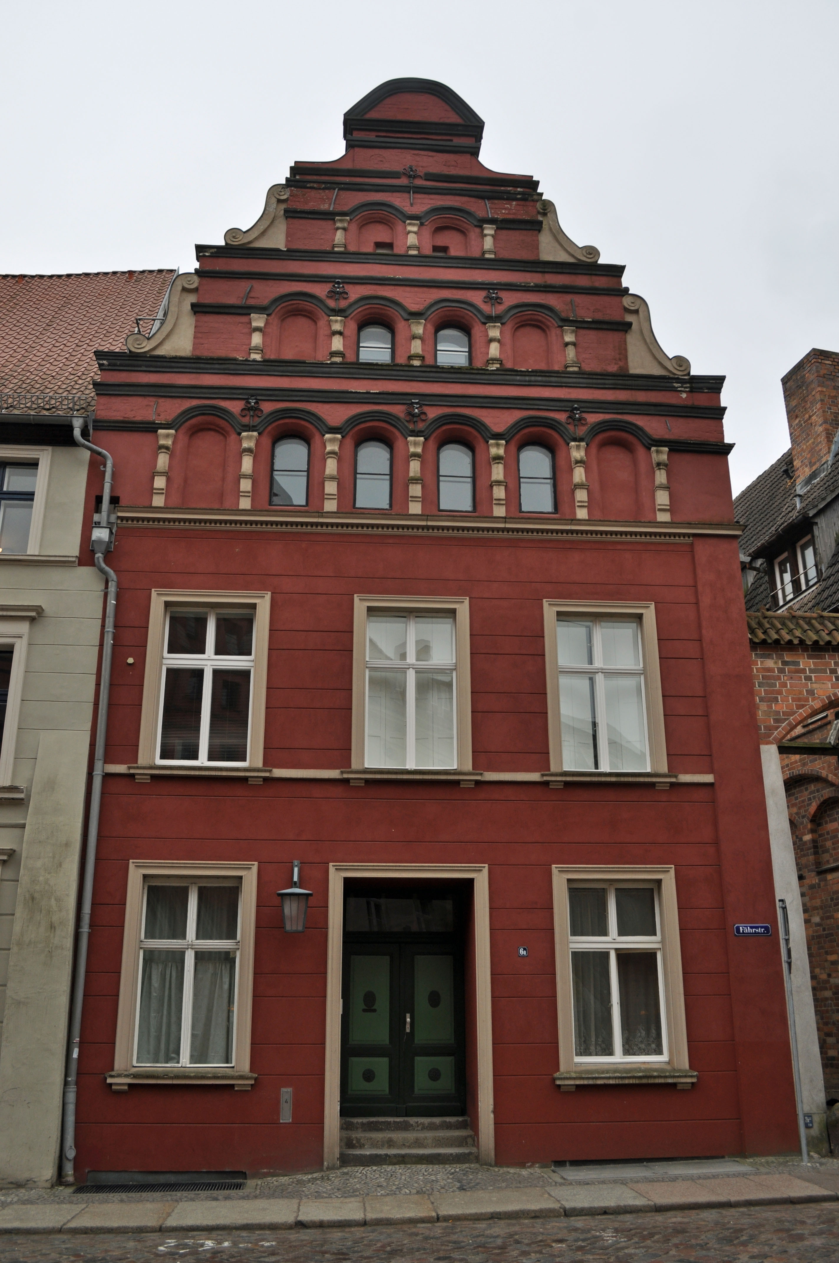 Gebäude bzw. Gebäudedetail in Stralsund. Straße und Hausnummer siehe Dateiname.